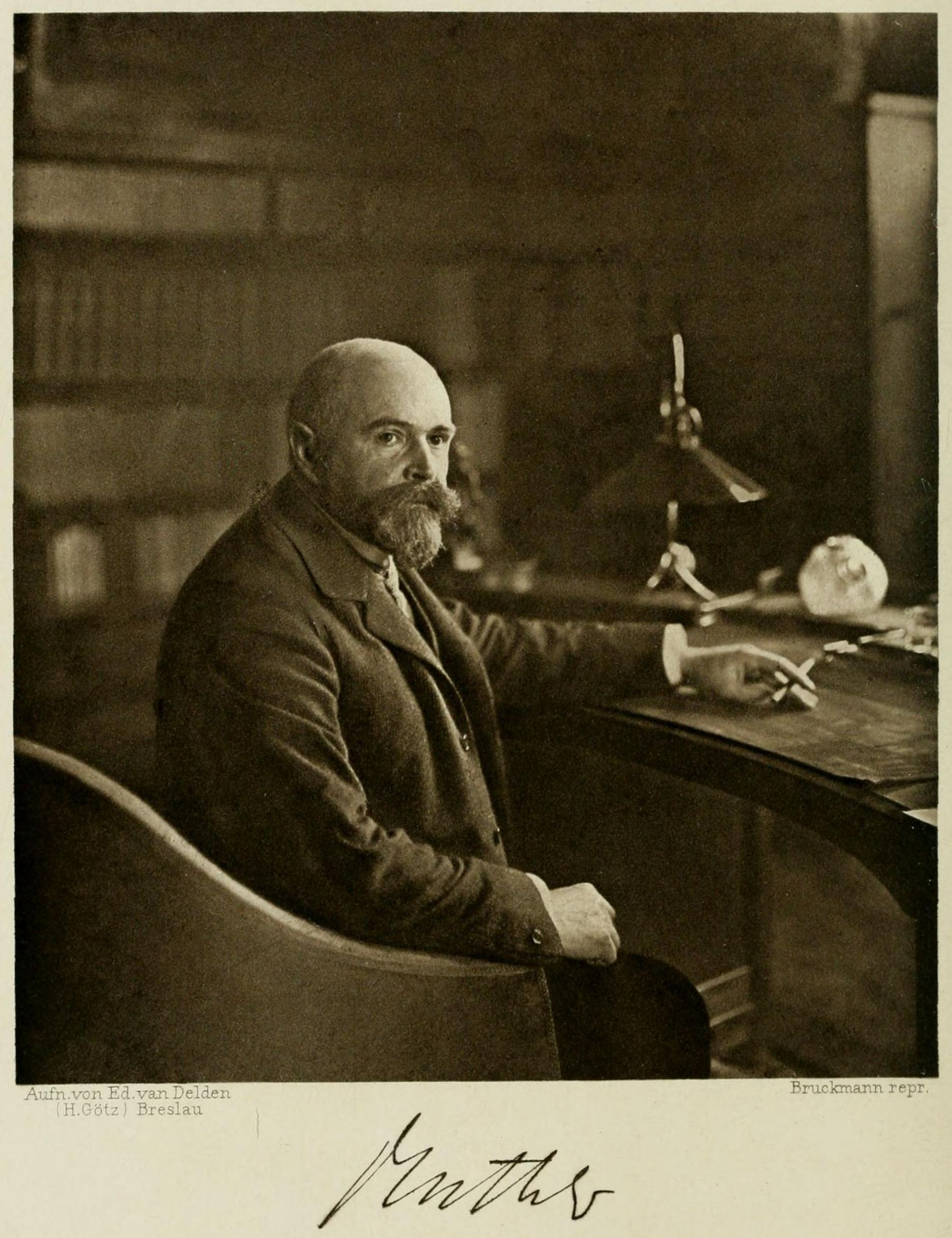 Porträt: Richard Muther. In: Geschichte der Malerei. 1. Band, 2. Auflage. Neufeld & Henius, Berlin 1912